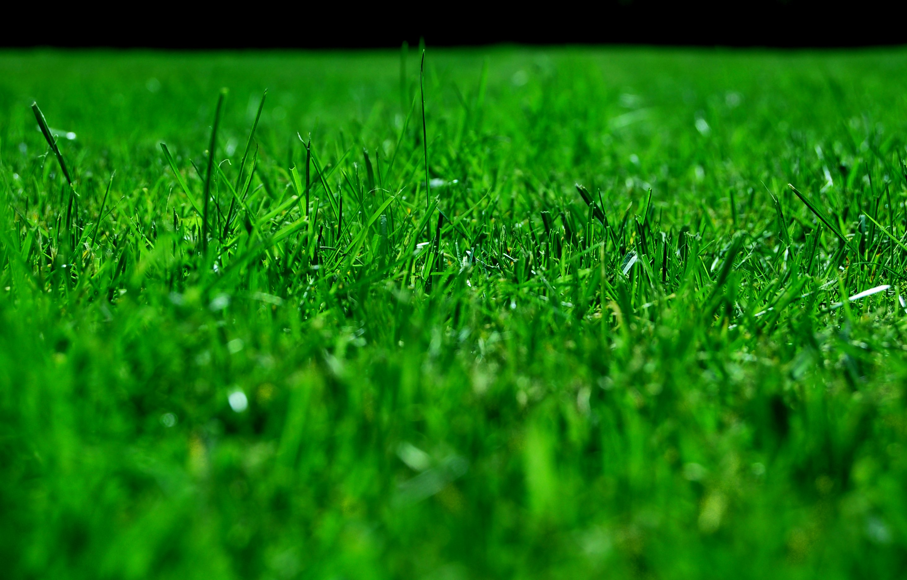 Lawn, Gräsmatta